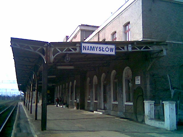 Stacja kolejowa w Namysłowie (Namysłów) Namyslow railstation Budynek stacyjny i peron pierwszy.